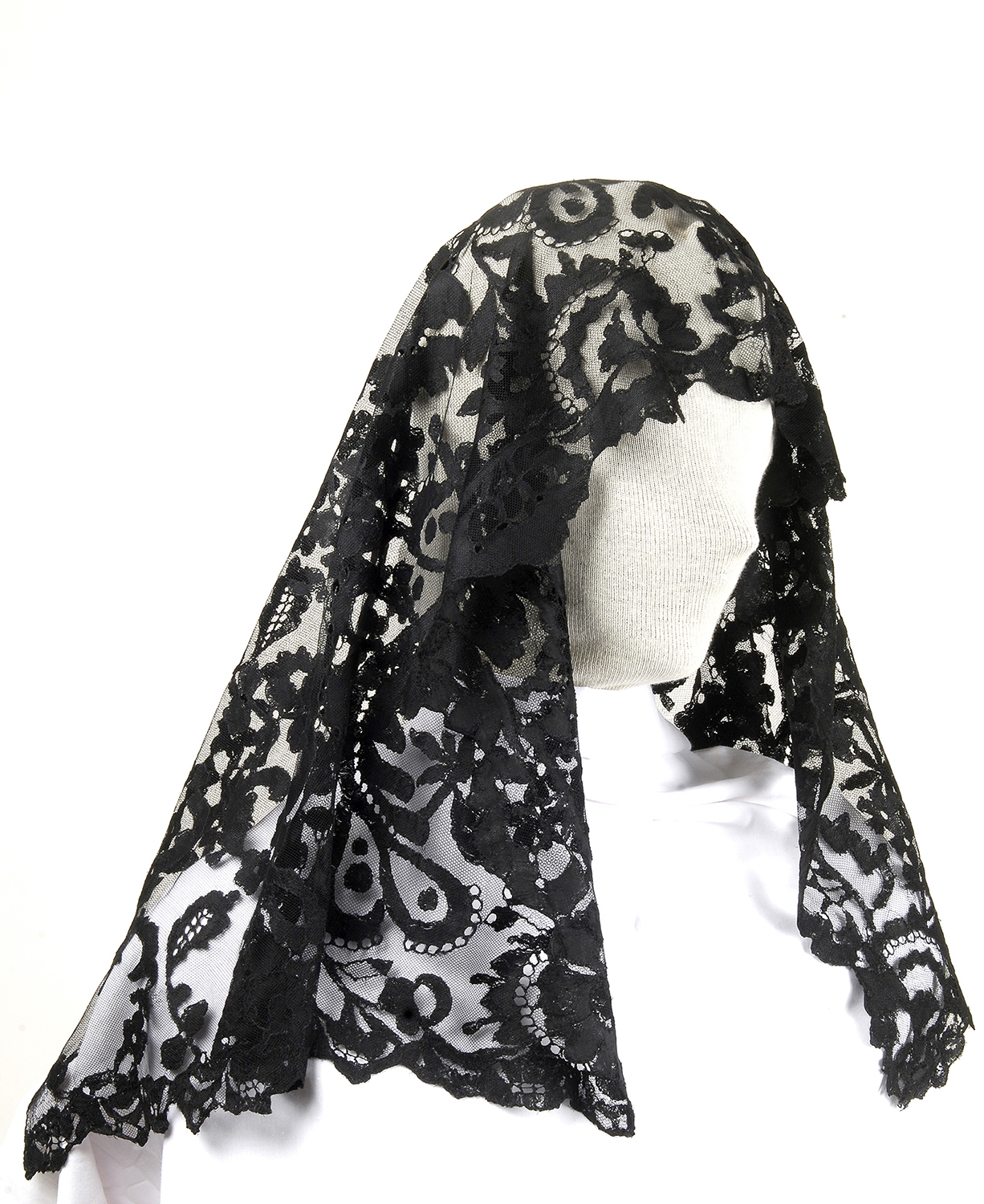 Fotografies dels objectes de l'exposició permanent de la sala "Secà i Muntanya" del Museu Valencià d'Etnologia - Fotografies de Mateo Gamon. Mantellina de blonda. Segle XX.